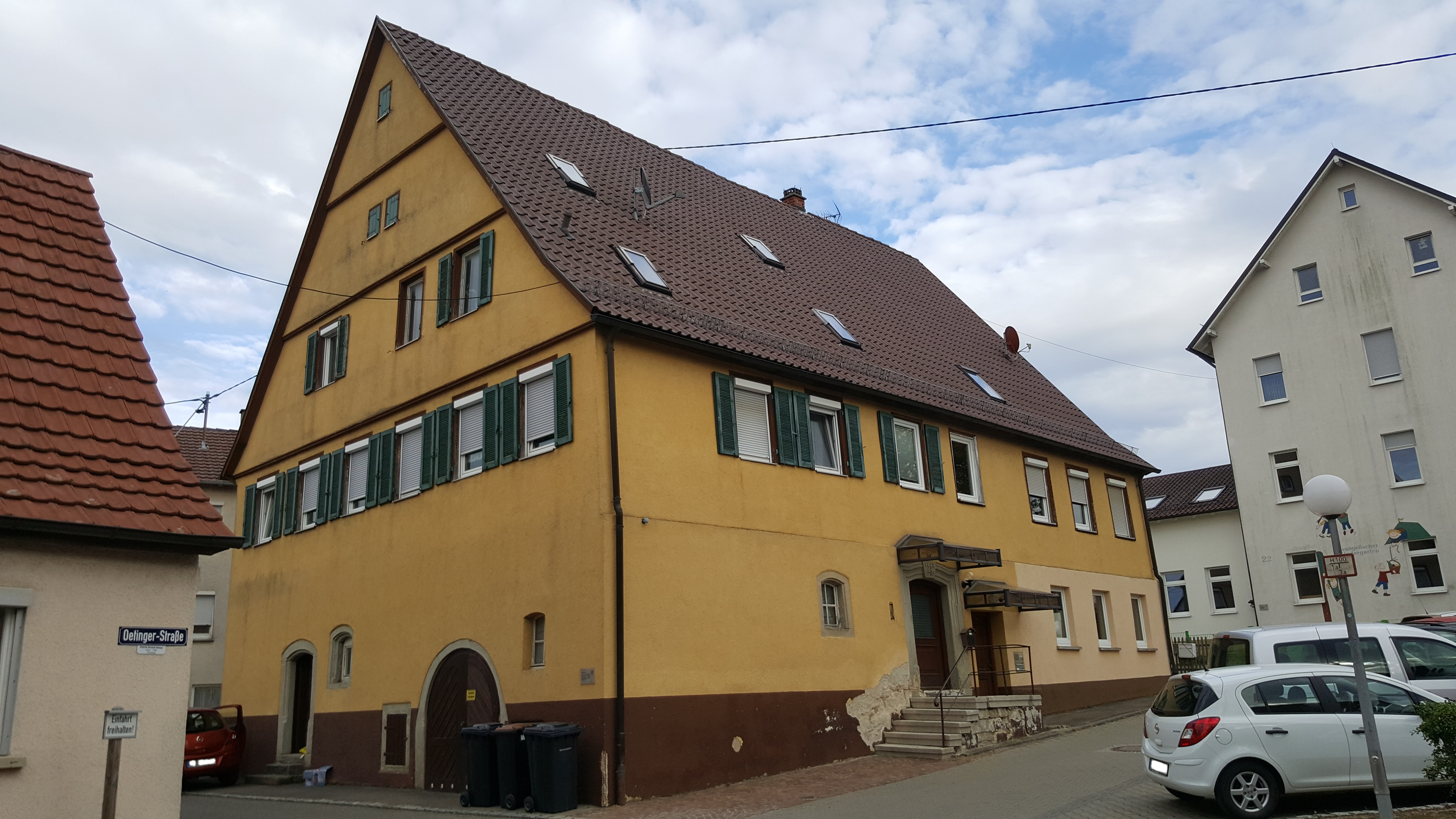 Walddorfhäslach altes Schulhaus II Türsturz 1797 Kern mittelalterlich GGustav-Werner-Straße 24